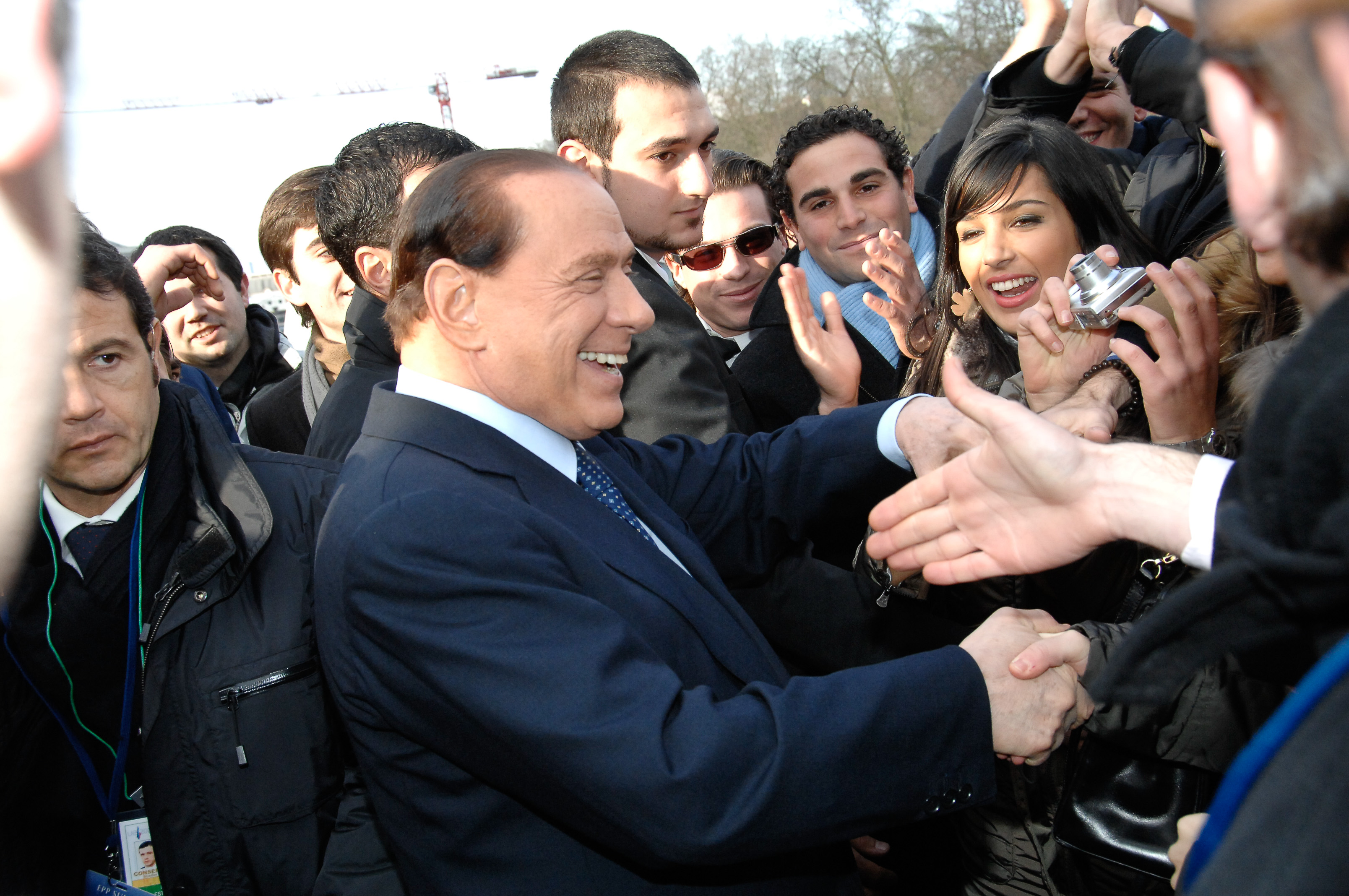 EPP Summit 11 December 2008